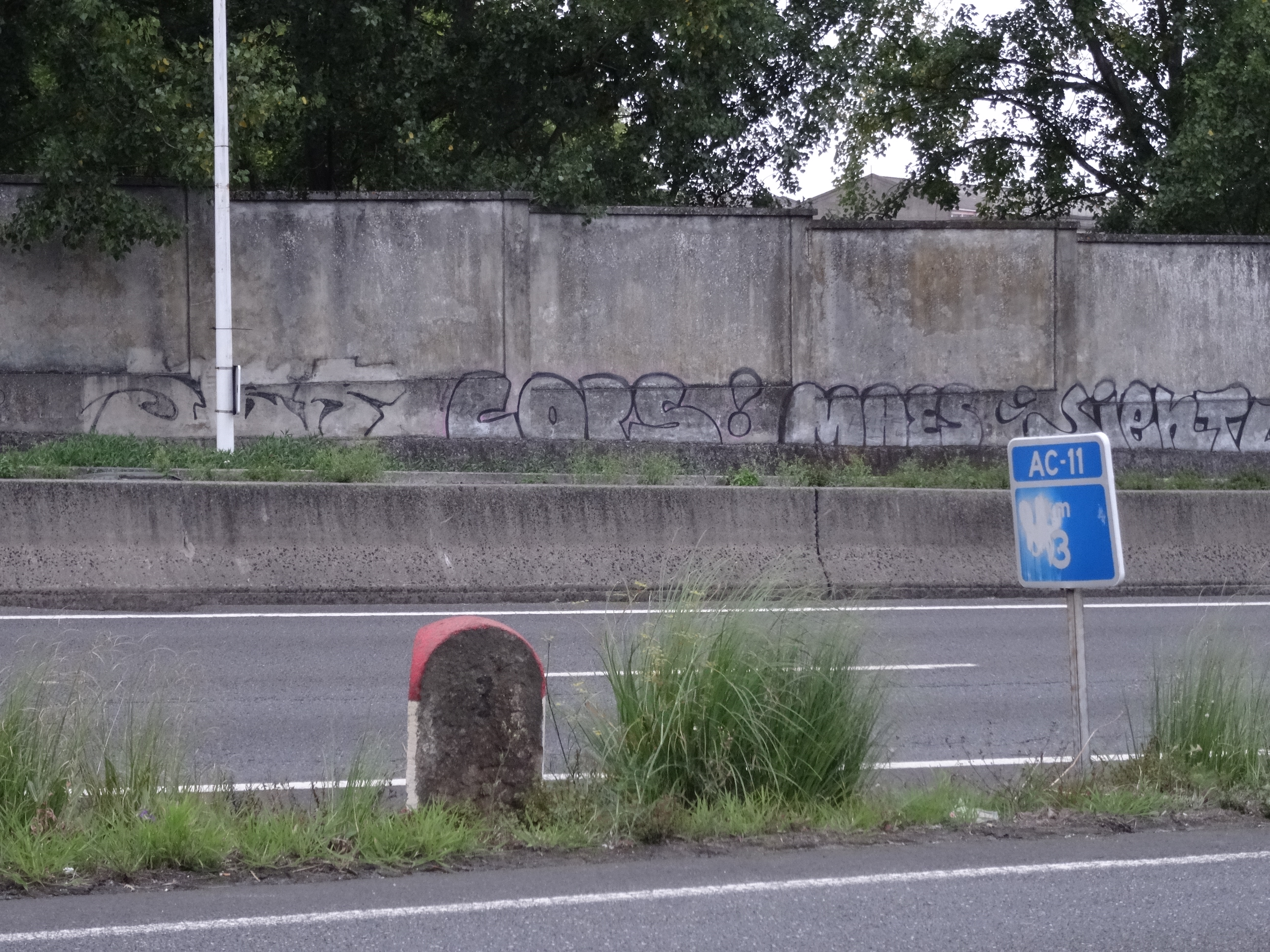 Ver título.